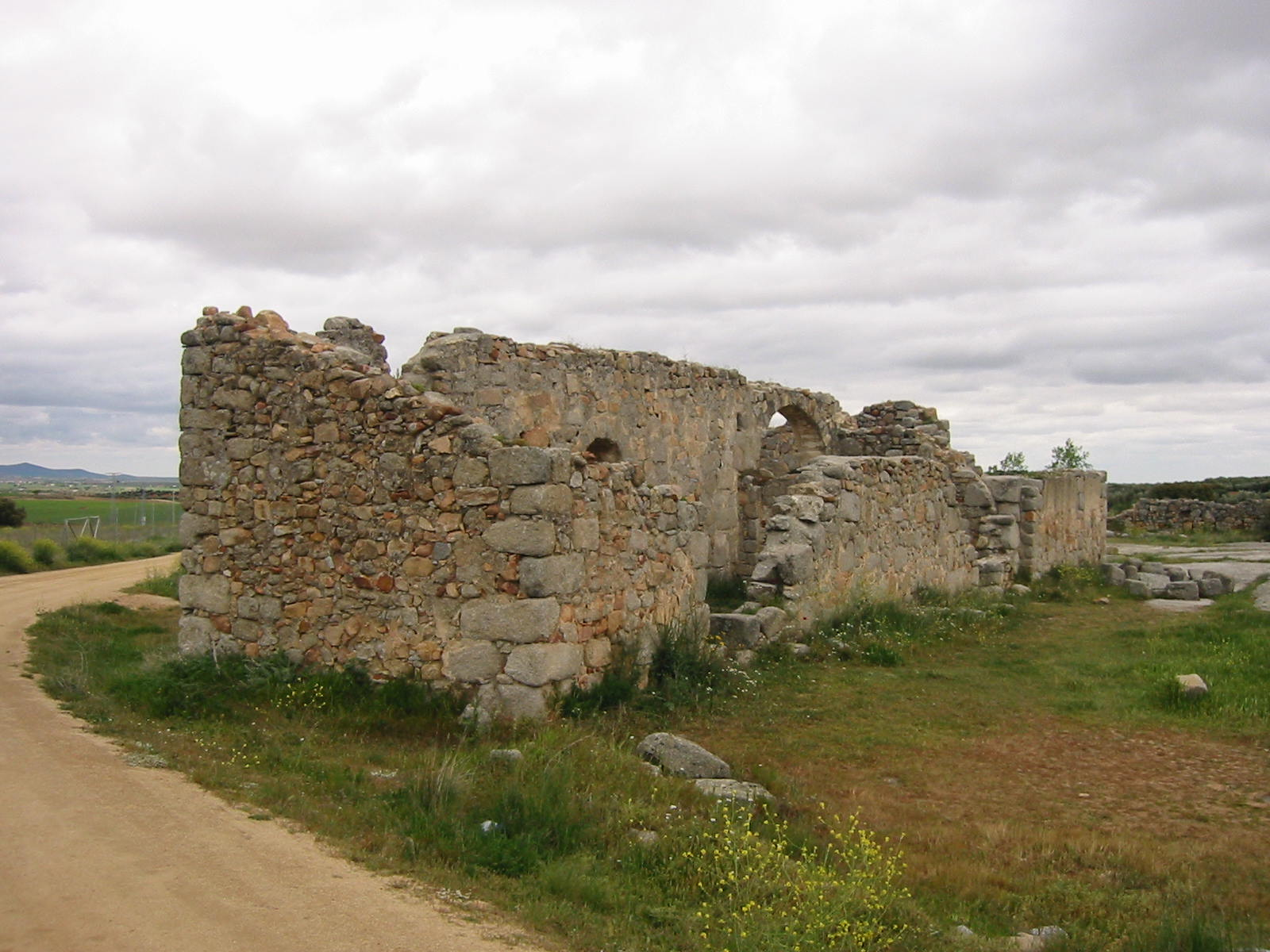 Iglesia visigoda de San Pedro de la Mata, Casalgordo (Toledo)